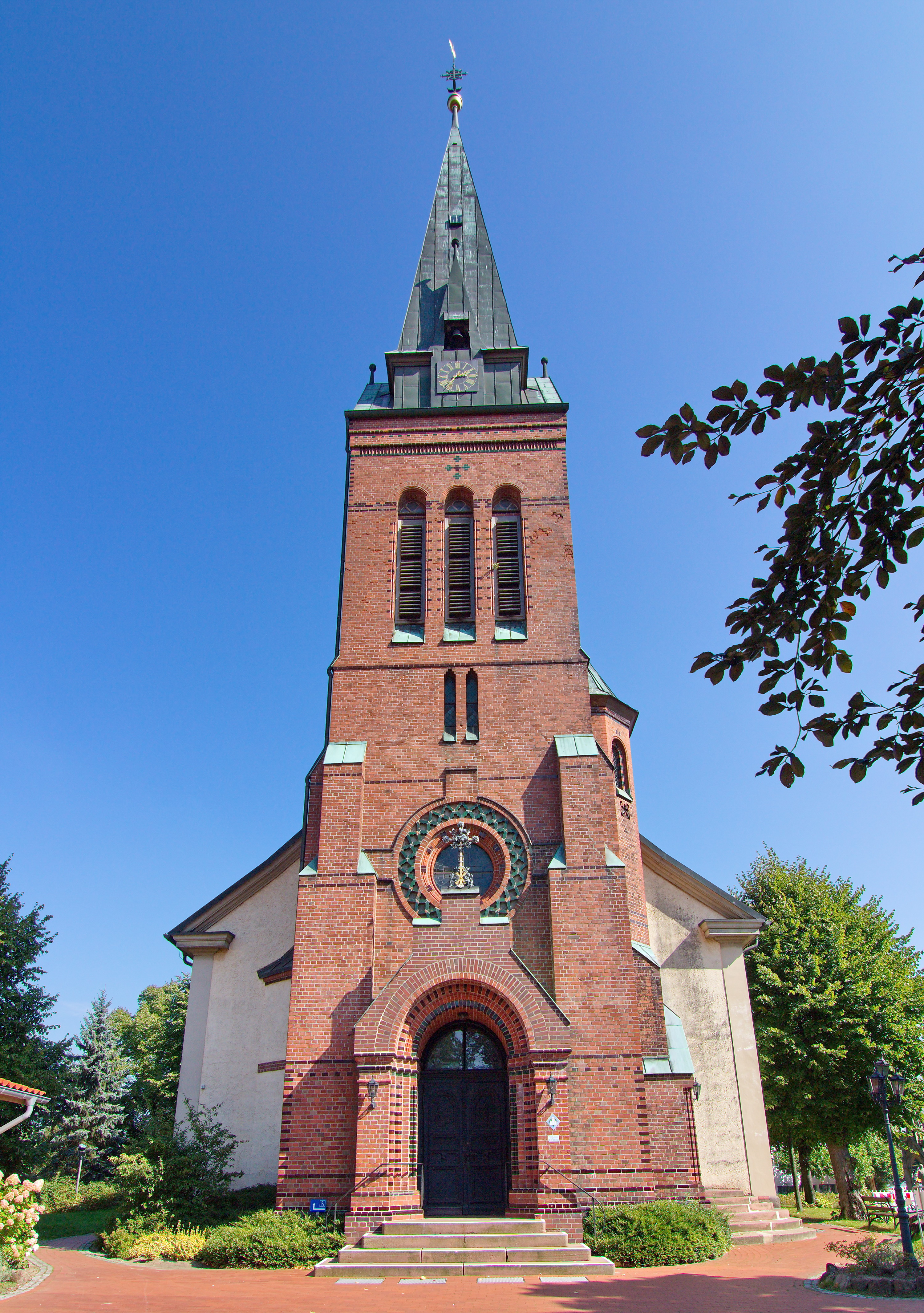 St.-Dionysius-Kirche in Bad Fallingbostel, Niedersachsen, Deutschland